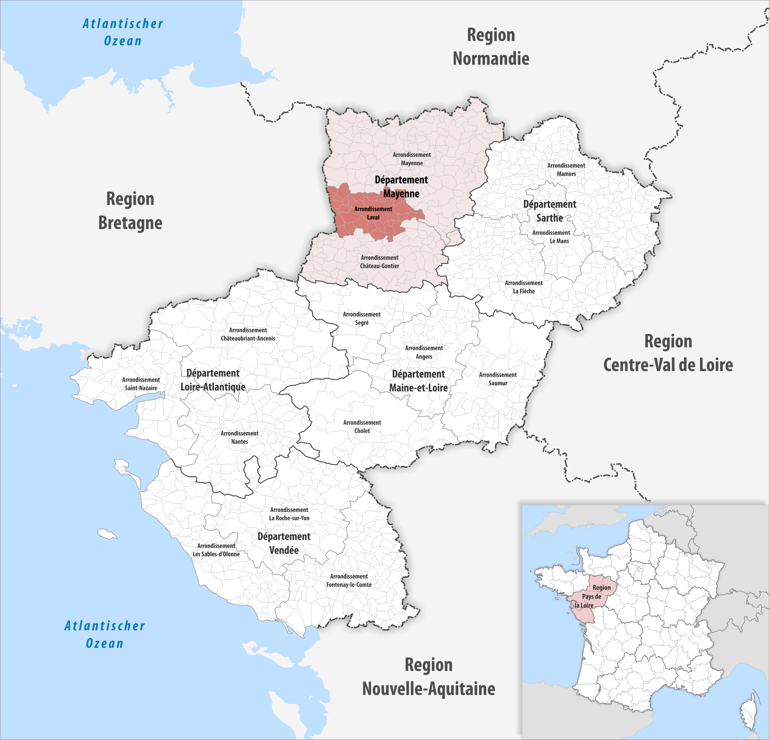 Lage des Arrondissements Laval